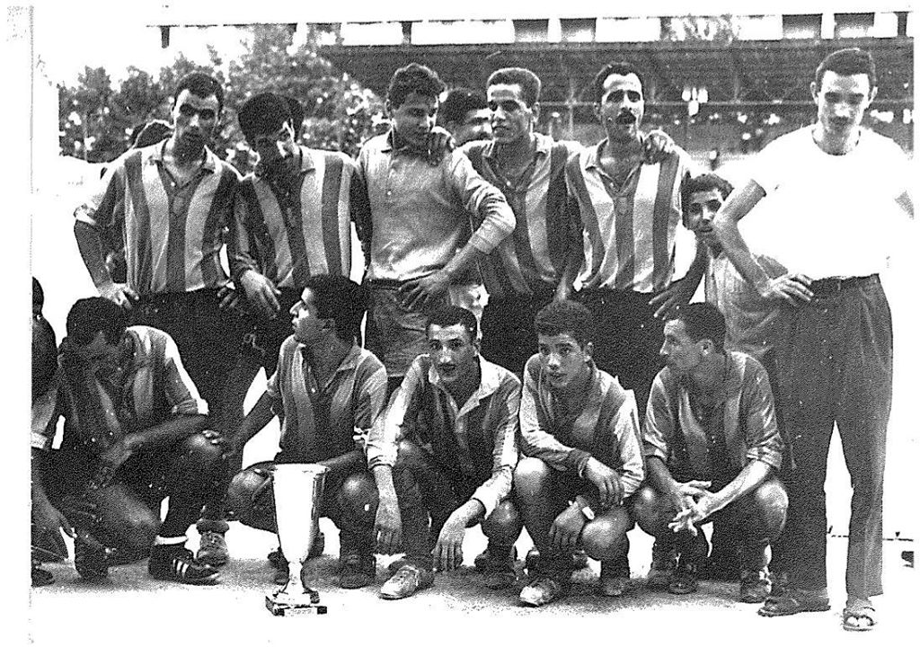 CRB des sixties' 1